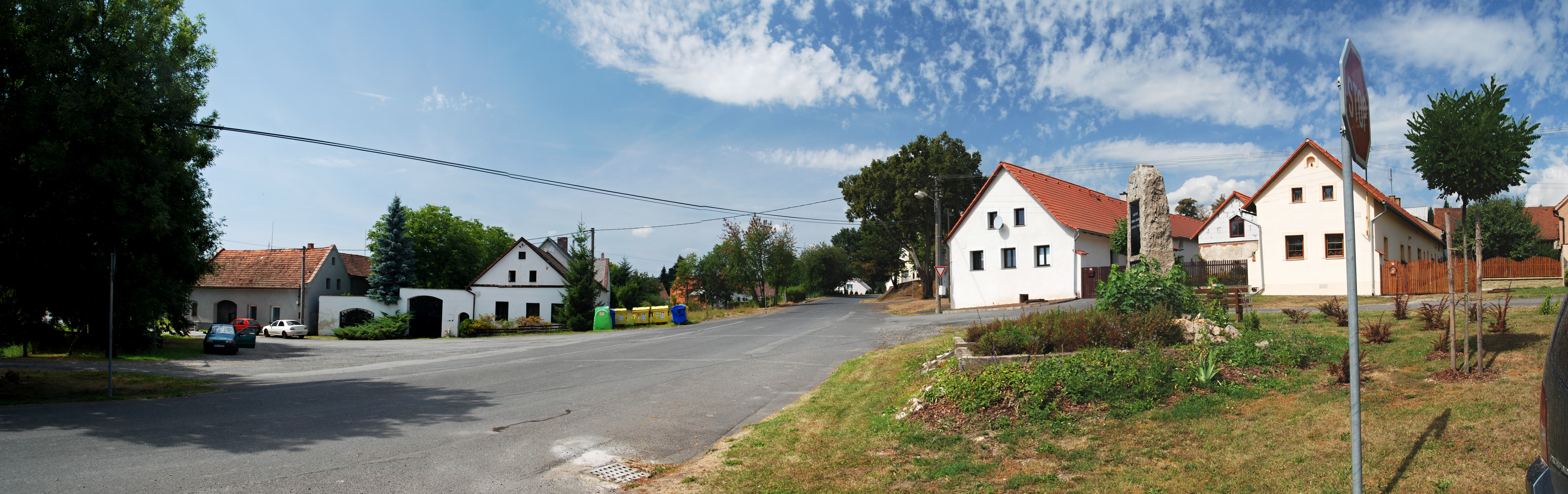 Obec Holostřevy v okrese Tachov